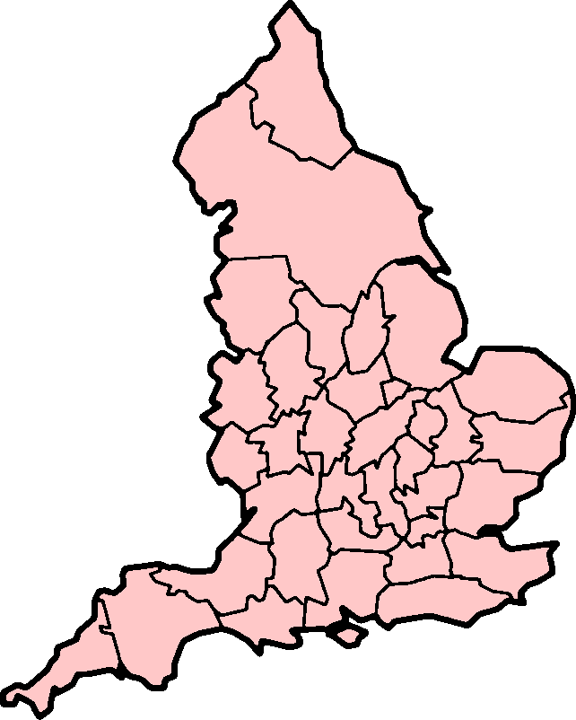 Traditionelle Grafschaften Englands 1086.